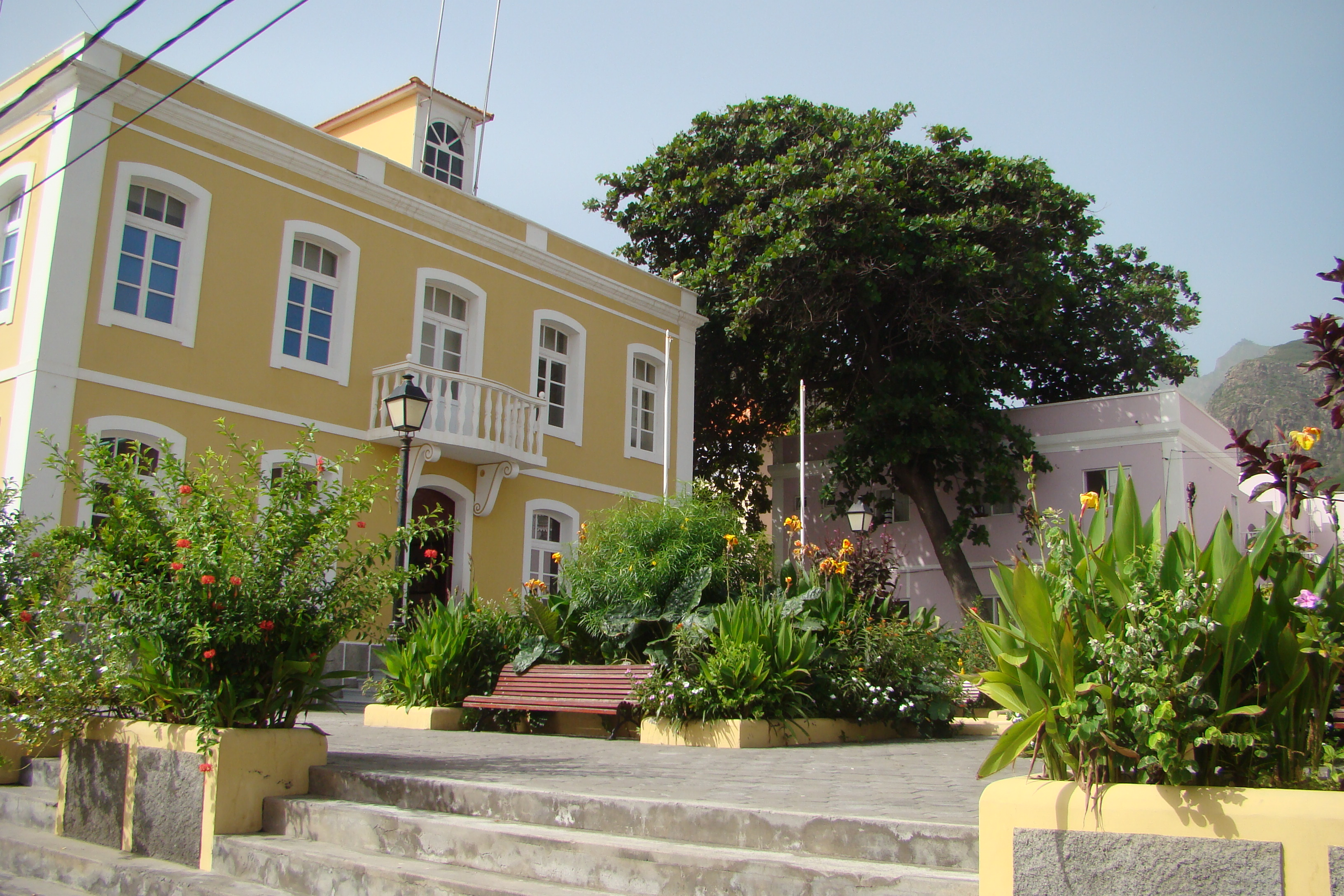 Edificio del ayuntamiento del municipio Paul, en la localidad de Vila das Pombas